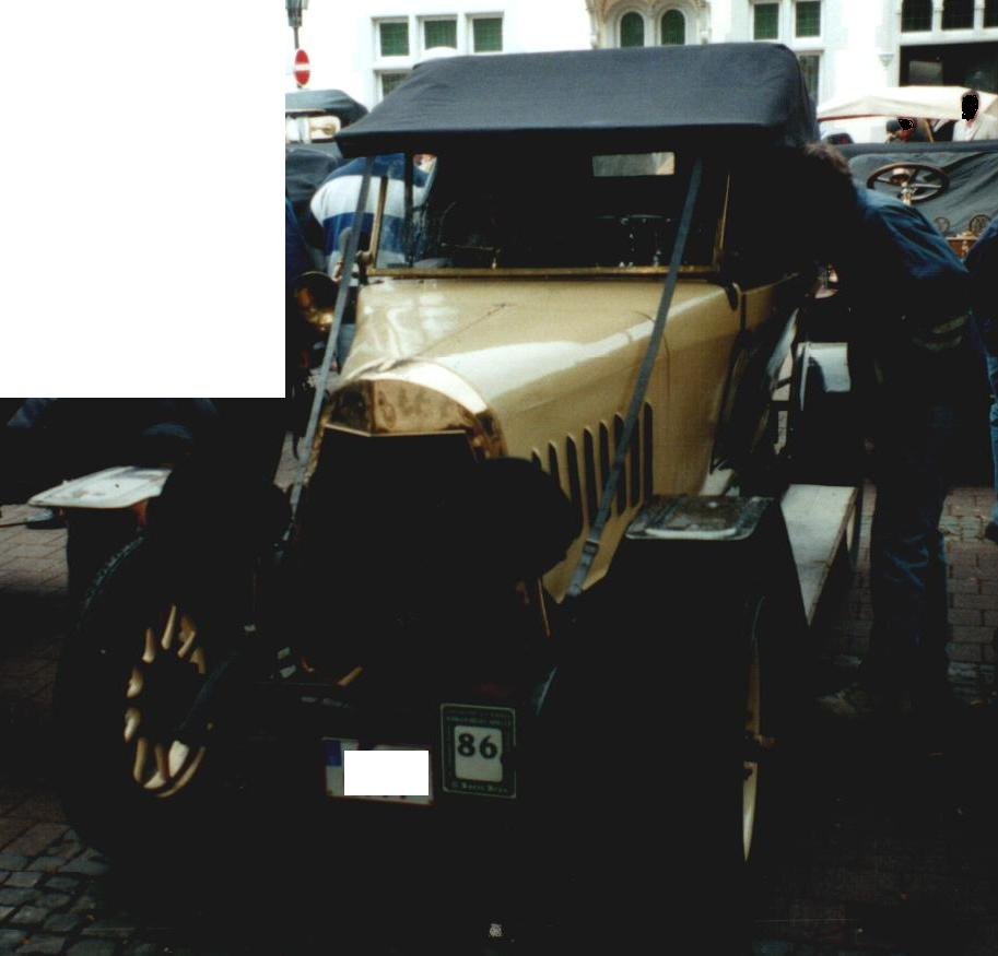 MAF 1913